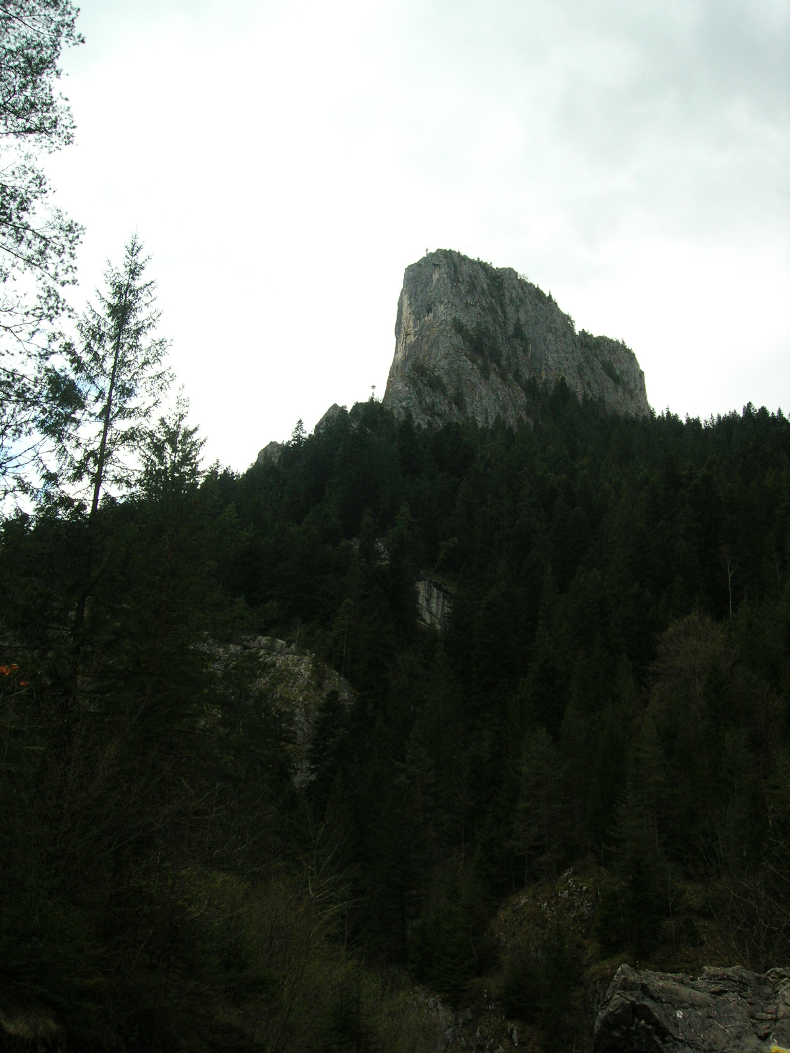 Az Oltár-kő (románul Piatra Altarului) a Békás-szoros legszembetűnőbb sziklatornya, a romániai Hagymás-hegységben található.